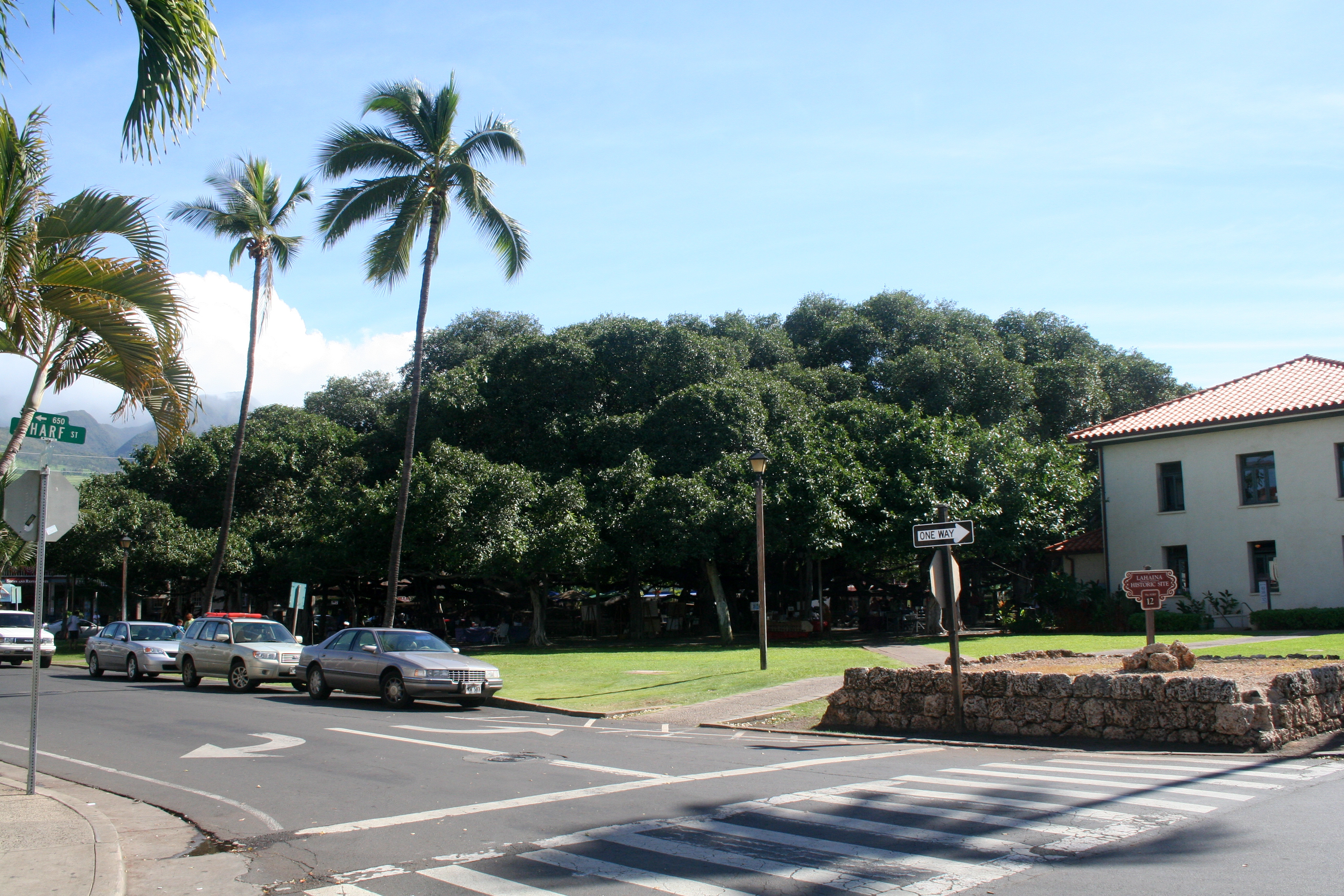 One Big Banyan Tree